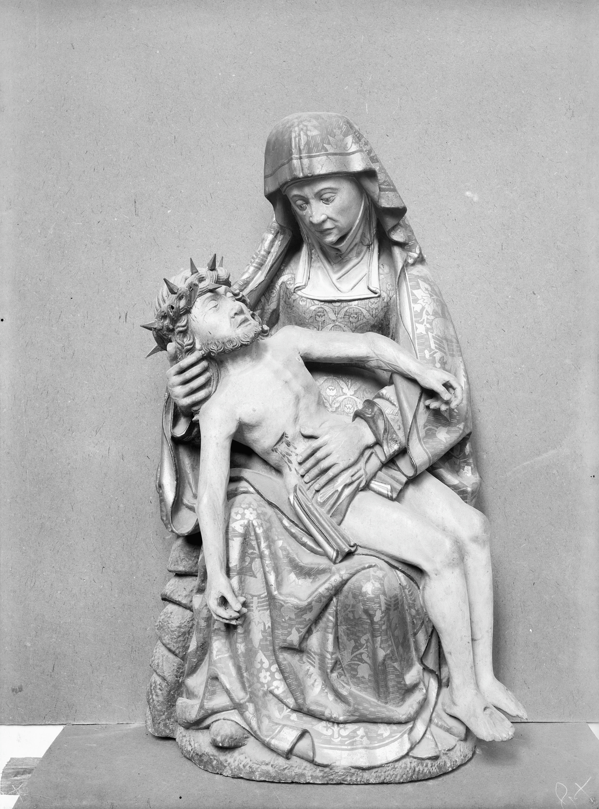 Sint Martinus Of Rooms-Katholieke Kerk: kleine Pieta